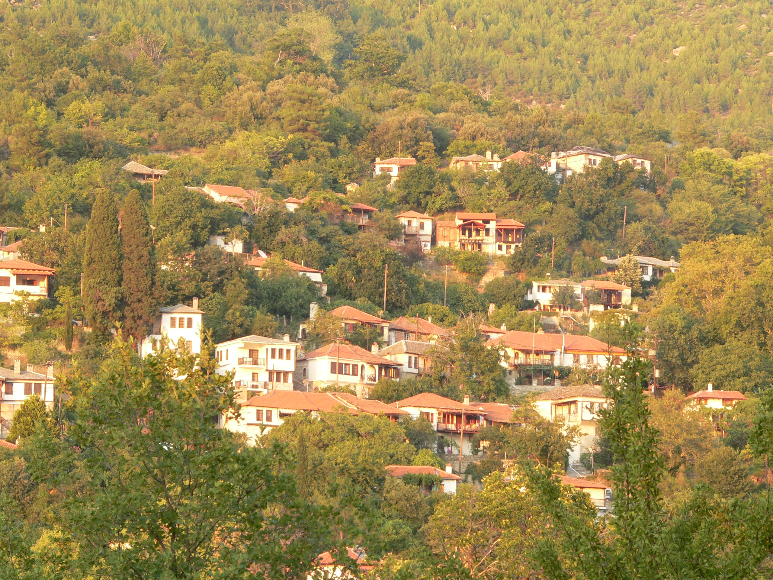 Μεγάλο Καζαβίτι